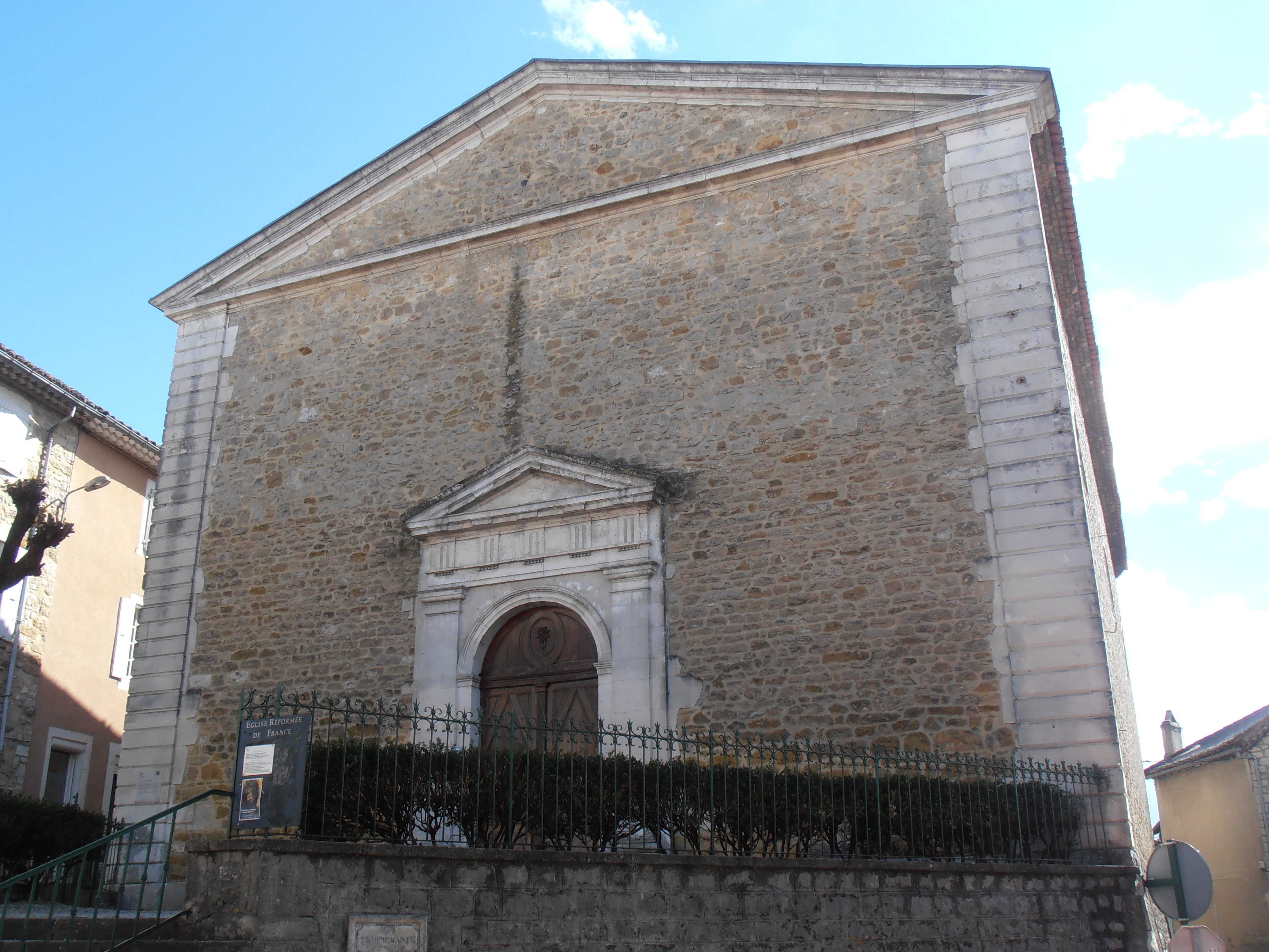 Ardèche, Vallon-Pont-d'Arc, Église réformée